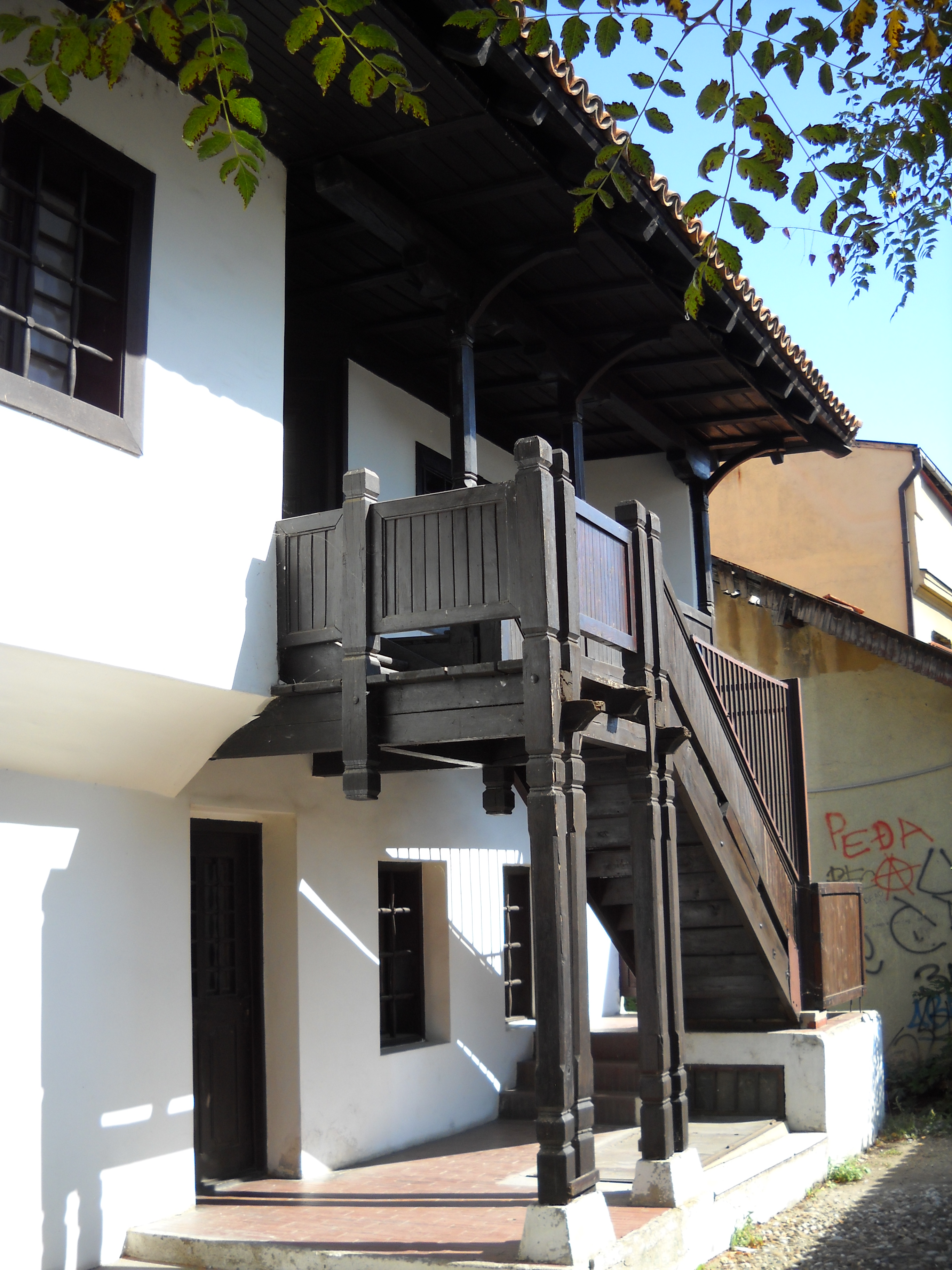 Predstavlja jedan od spomenika orjentalne arhitekture u ovom kraju.Prema legendi,sagrađen je krajem 18. Veka. Pripadao je nepoznatom turskom begu. Po oslobođenju Timočke krajne od Turaka 1833.godine odkupljuje ga trgovac Radul Gligorijević,po kome je čardak dobio ime. Kompletno je obnovljen 1975.godine. Na spratu je smeštena stalna postavka o u prizemlju je galerija u kojoj se pored likovnih održavaju i prodajne izložbe skulptura i proizvoda domaće radenosti kao i književne večeri i promocije knjiga. Prostor Radul-begovog čardaka je i omiljeno mesto okupljanja mladih.